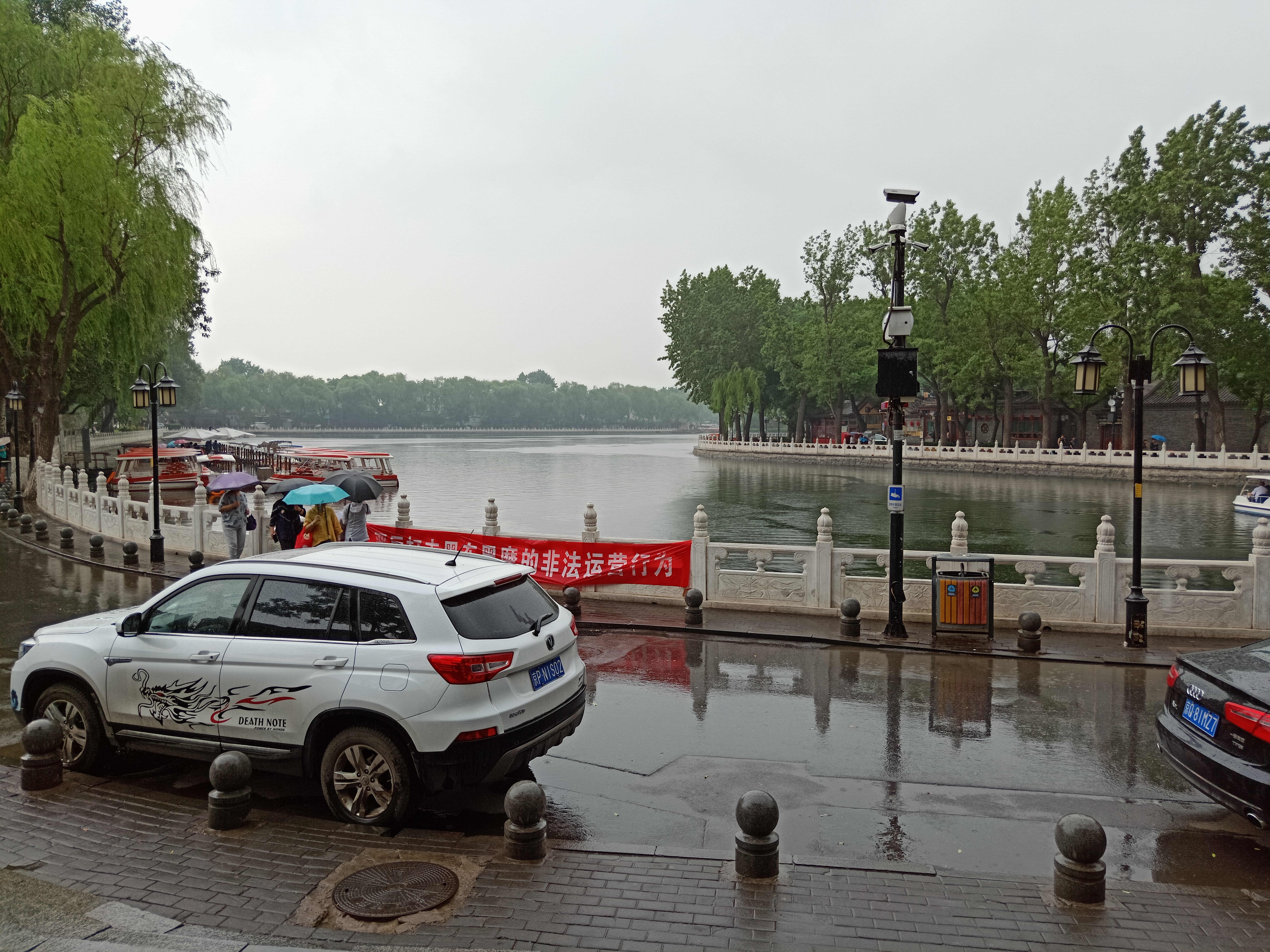 粵語: 什剎海（前海）